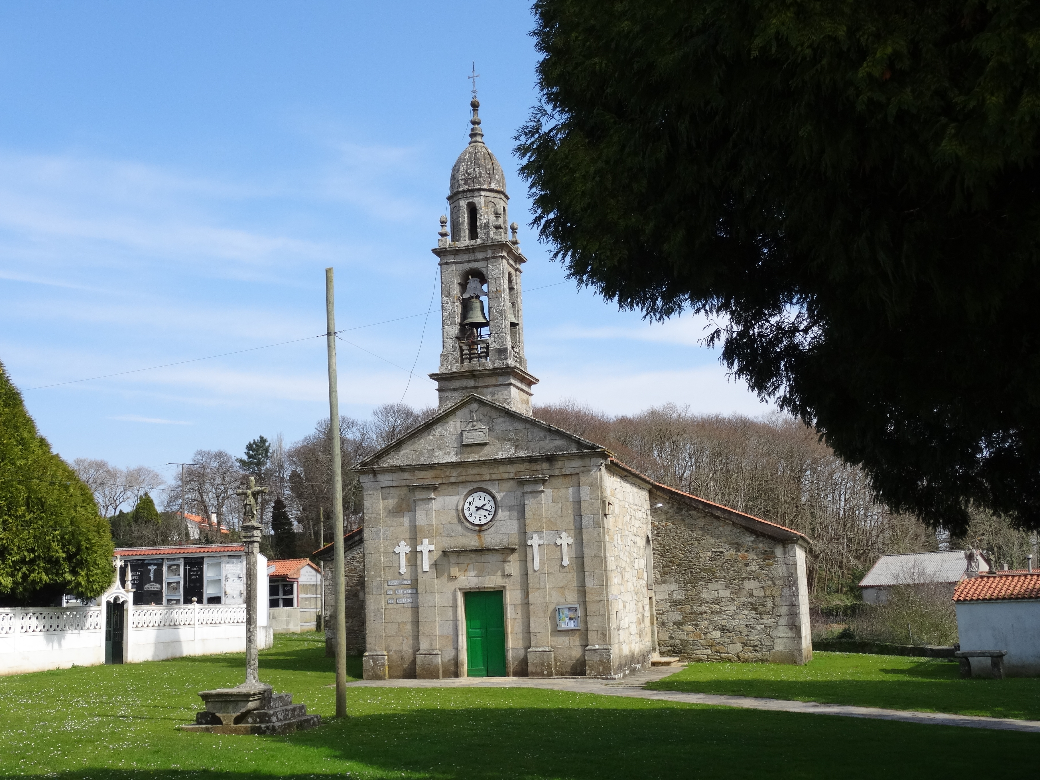 Igrexa de Santiago de Sísamo, Carballo.